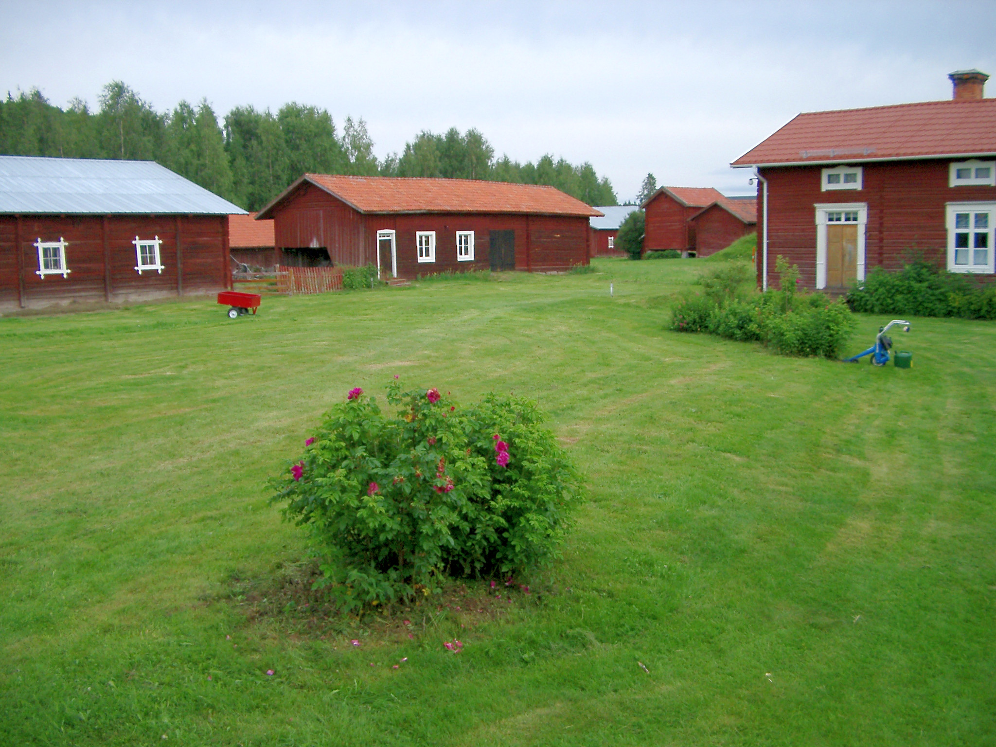 Eden